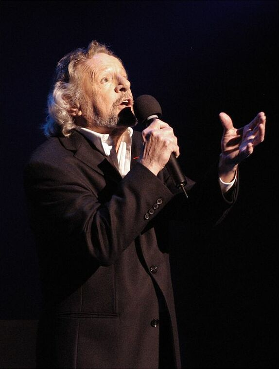 Commons: Claude Léveillée par Victor Diaz Lamich